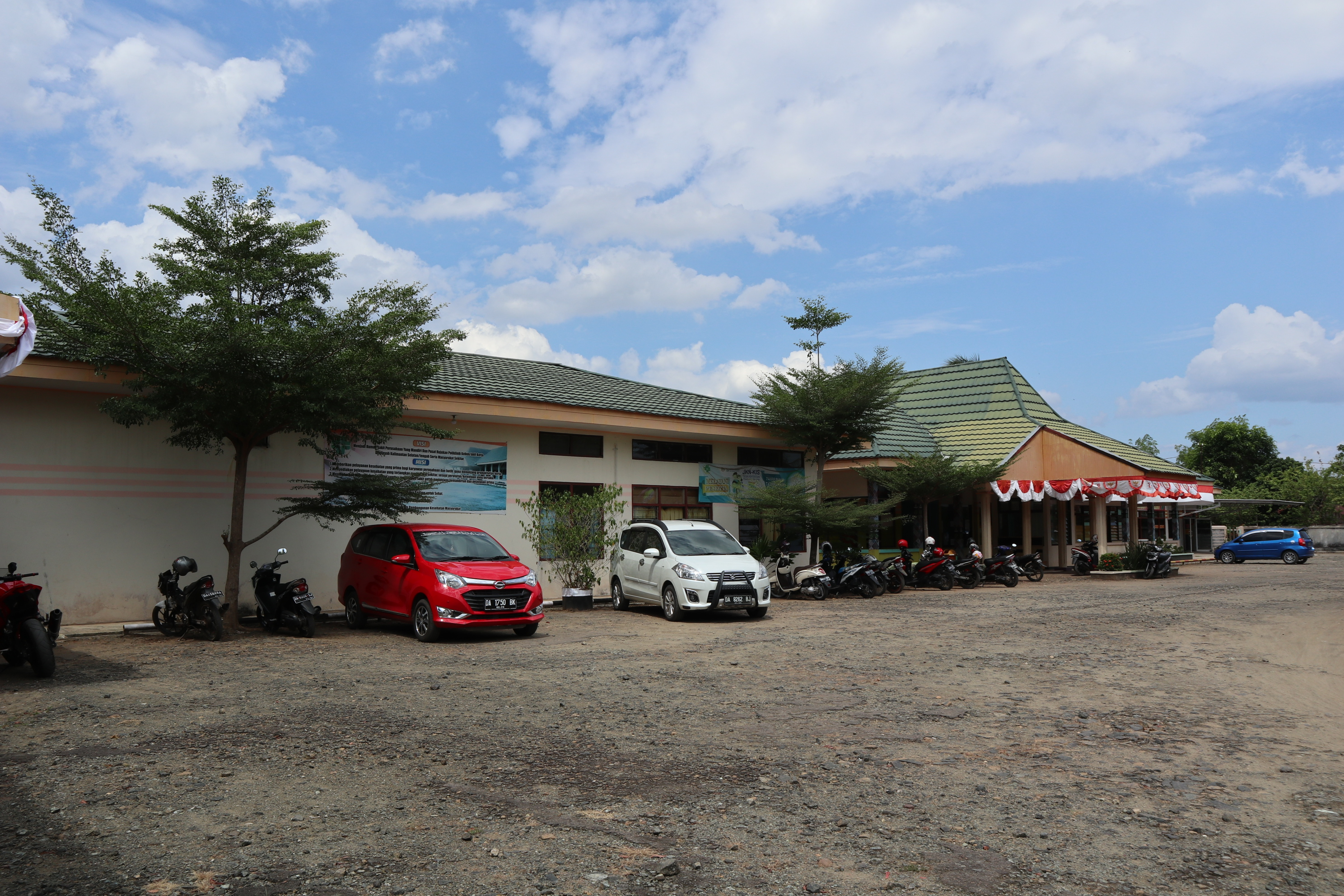 Rumah Sakit Danau Salak, rumah sakit swasta milik PTPN XIII di Kabupaten Banjar, Kalimantan Selatan.